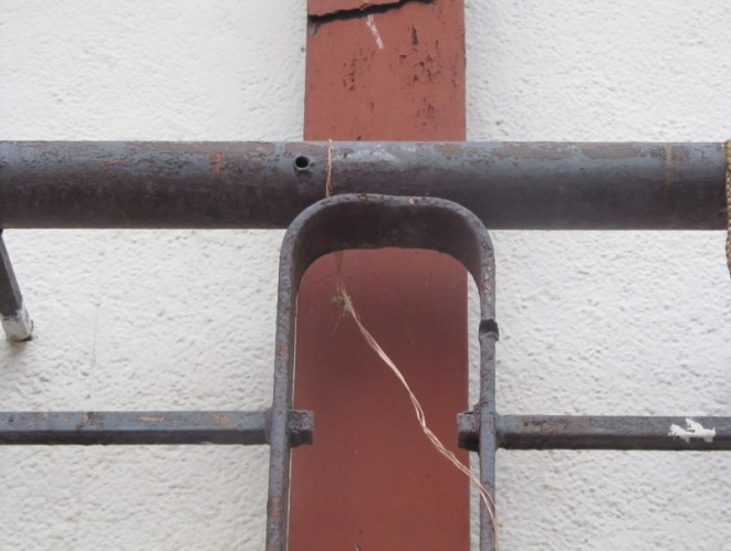 Fotografía de detalle de orificio de bala en pedazo de reja sobre la cruz.